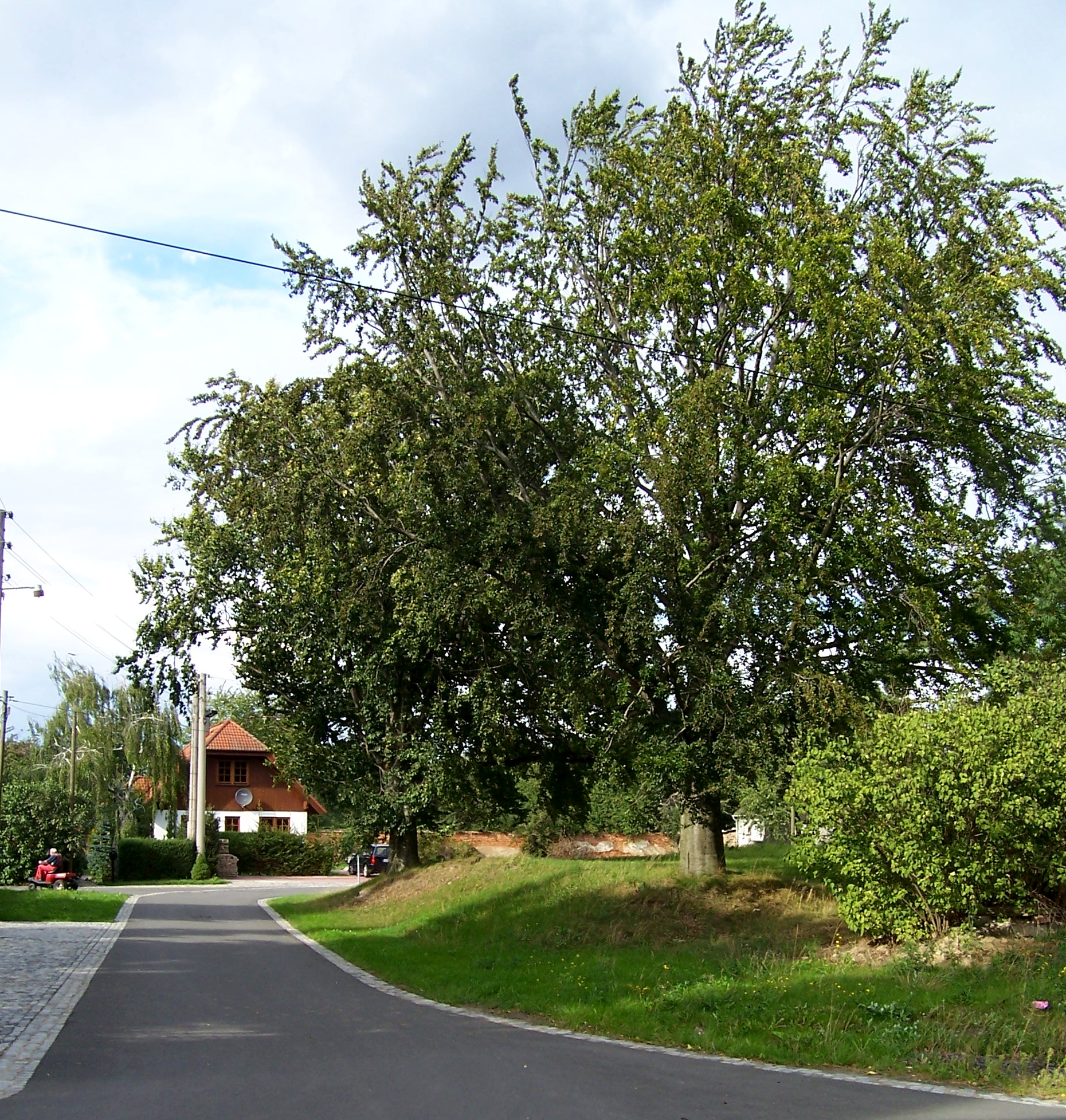 Ortsansicht des Ortsteils Trautzschen der Gemeinde Elstertrebnitz